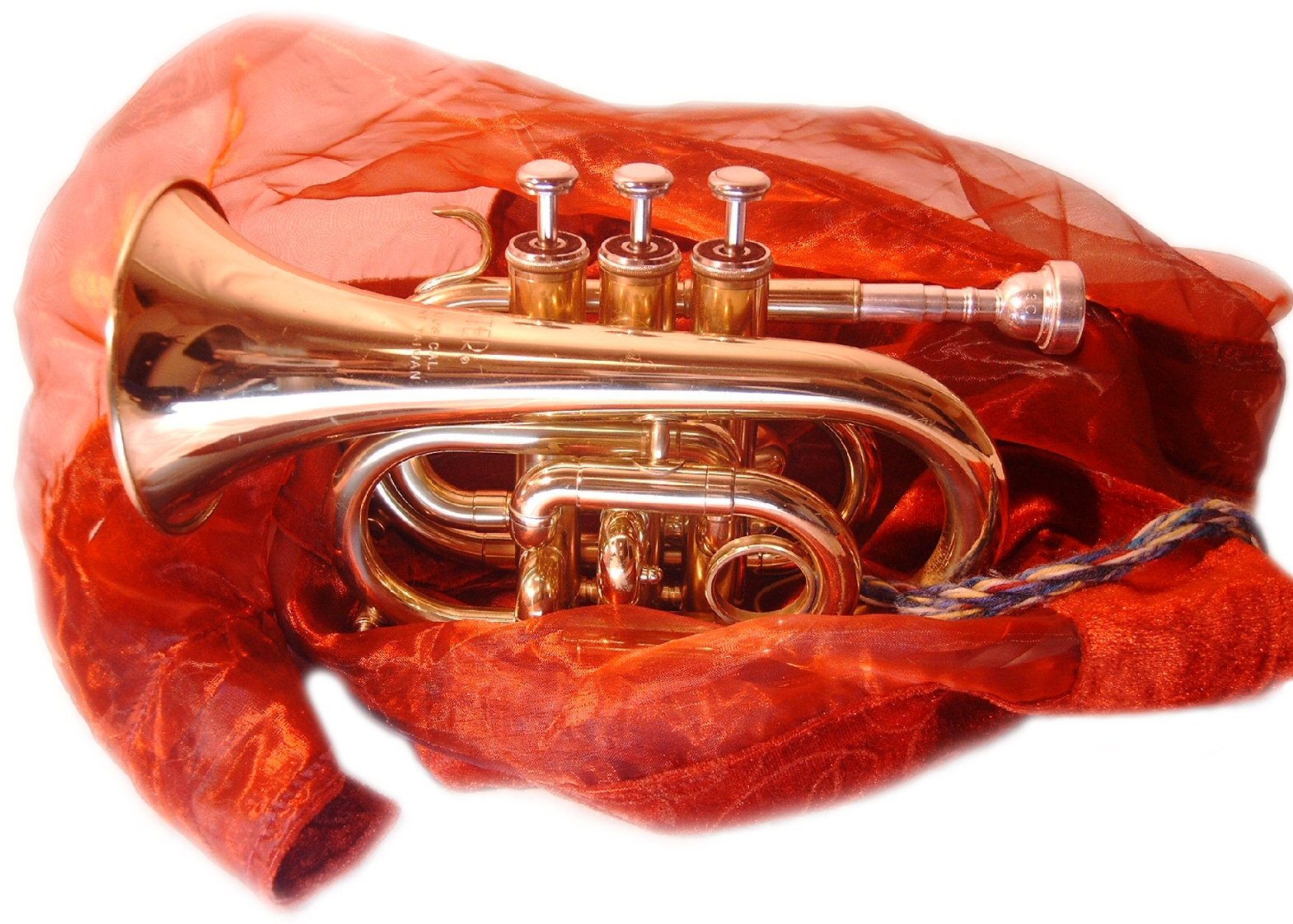 Pocket Trumpet, Model Jupiter, Length ~ 25cm Photograph: Dbenzhuser, 3. Januar 2005